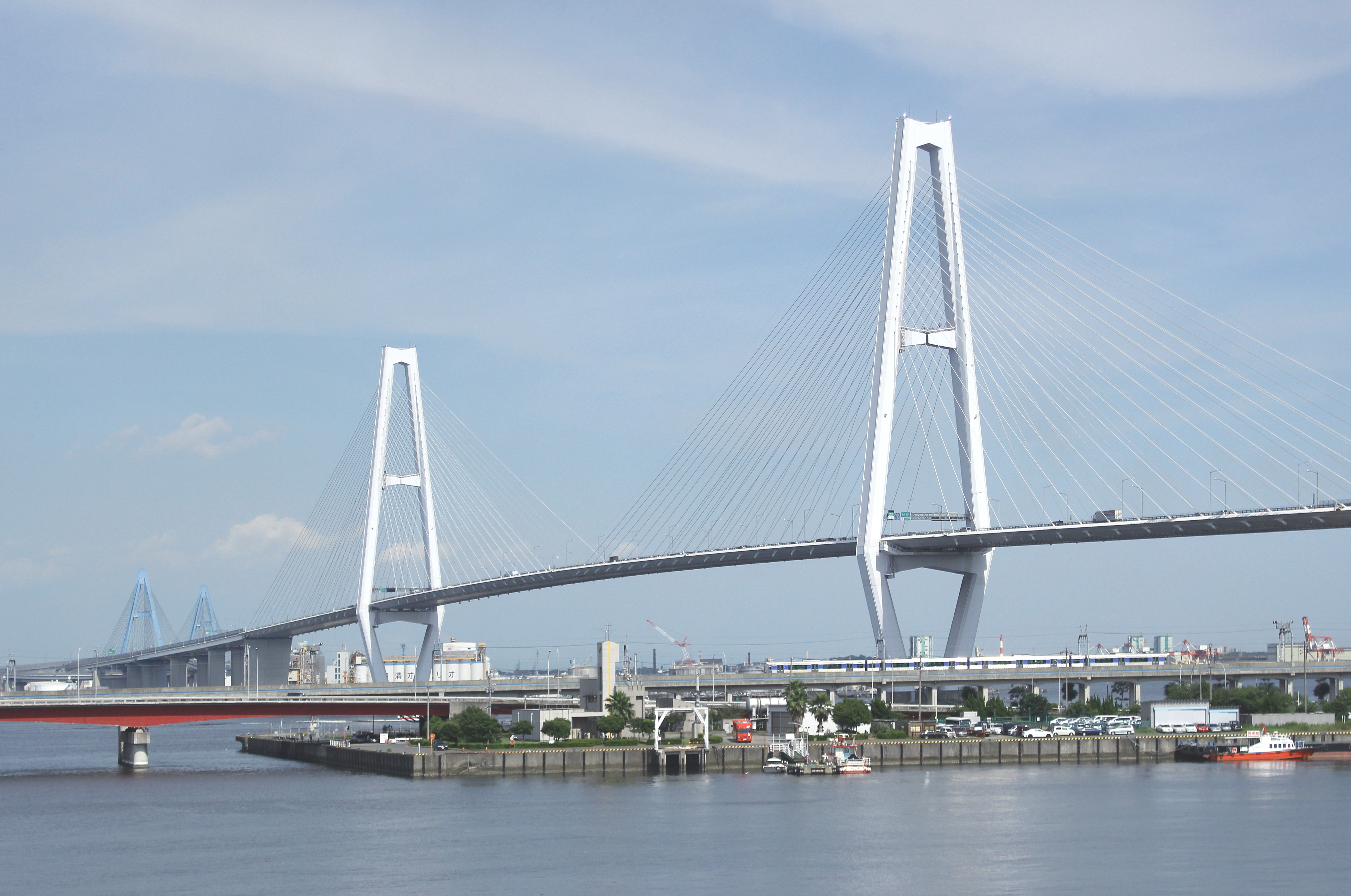 名港トリトン名港中央大橋と名港東大橋。金城ふ頭から撮影。